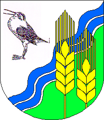 Tähtvere valla vapp